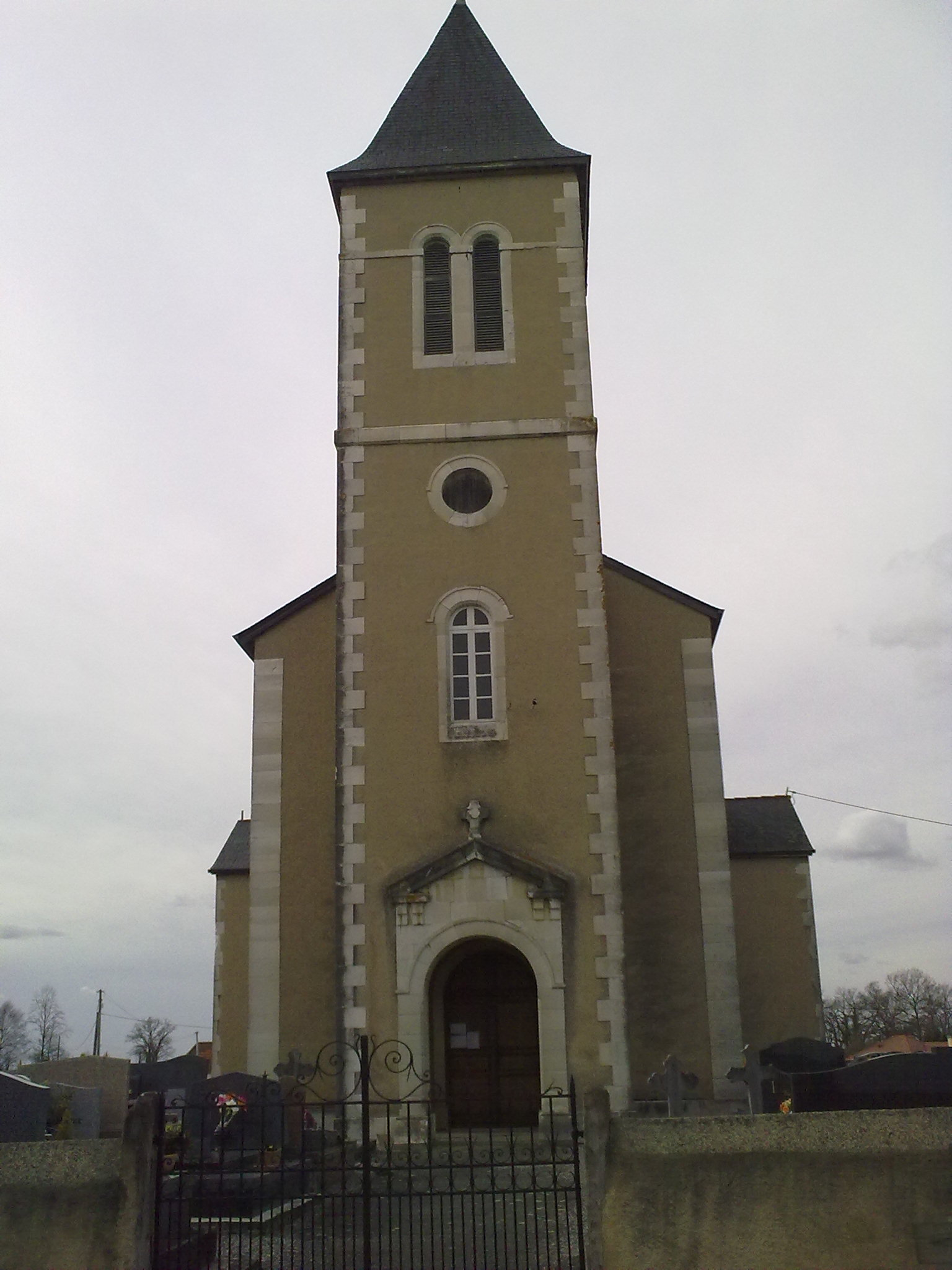 Eglise de Maucor ( Vue 2 )